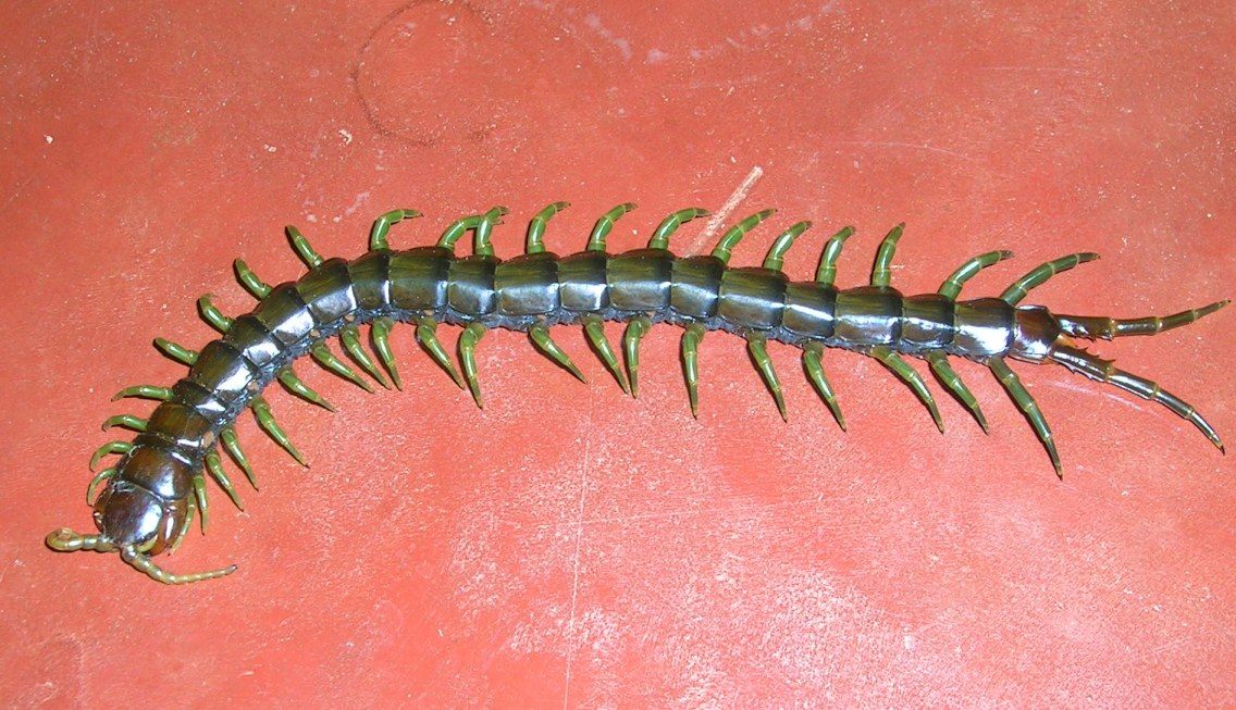 Ethmostigmus ? Centipede, Wayanad, Kerala